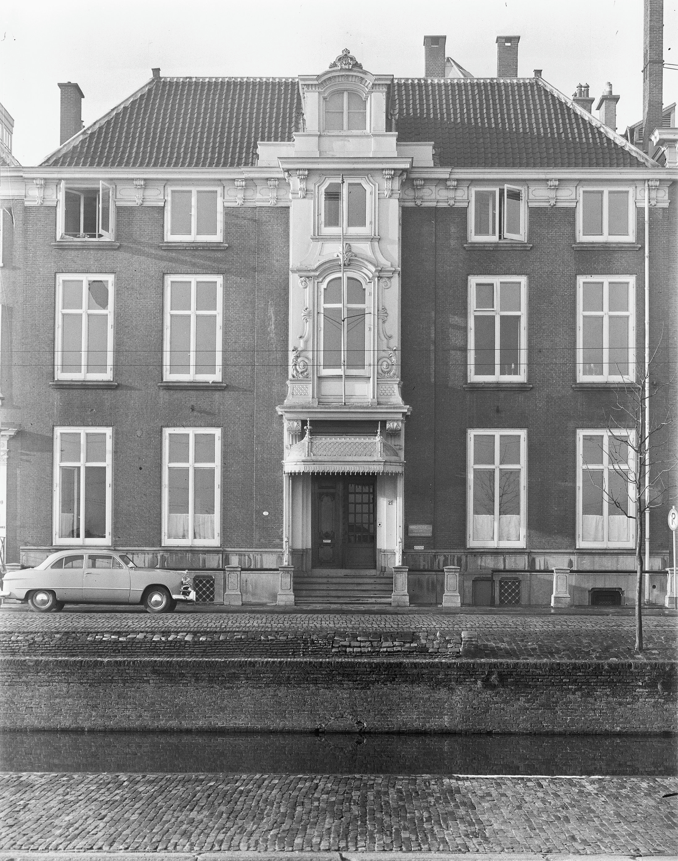 ingang Ministerie van Onderwijs, Kunsten en Wetenschappen